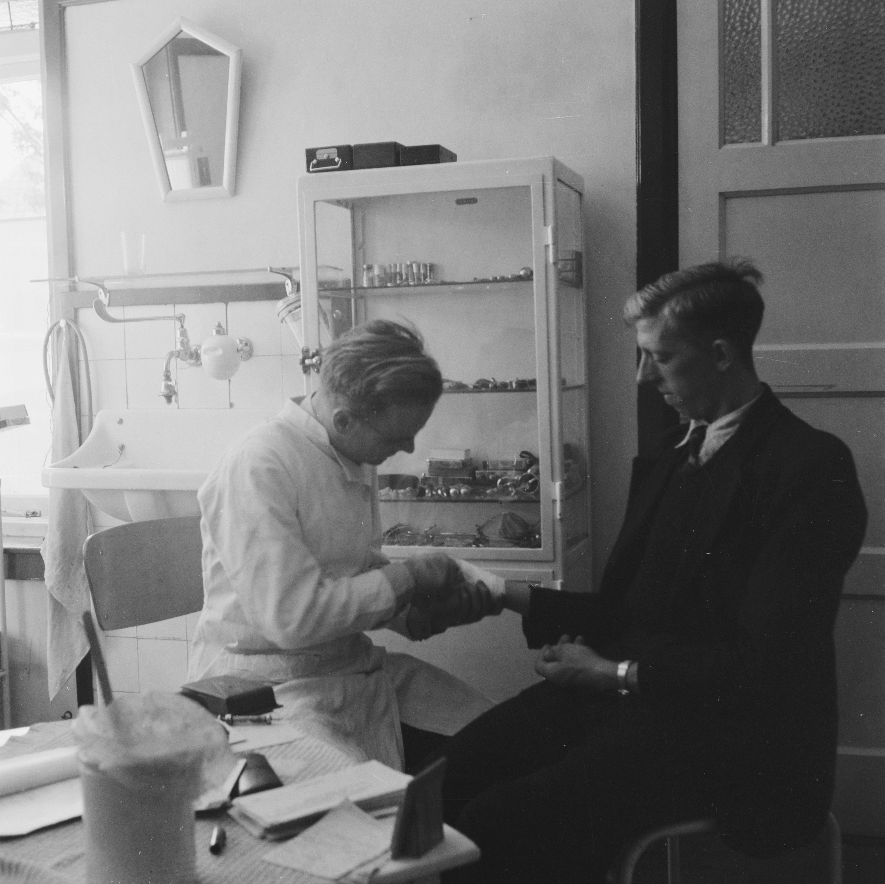 Collectie / Archief: Fotocollectie Anefo Reportage / Serie: Boerenfeest in een Drents dorp Beschrijving: Huisarts W. Vasbinder uit Gramsbergen verbindt een patiënt Datum: 1945 Locatie: Gramsbergen, Overijssel Trefwoorden: geneeskunde, huisartsen Persoonsnaam: Vasbinder, W. Fotograaf: Fotograaf Onbekend / Anefo Auteursrechthebbende: Nationaal Archief Materiaalsoort: Negatief (zwart/wit) Nummer archiefinventaris: bekijk toegang 2.24.01.03 Bestanddeelnummer: 900-7370